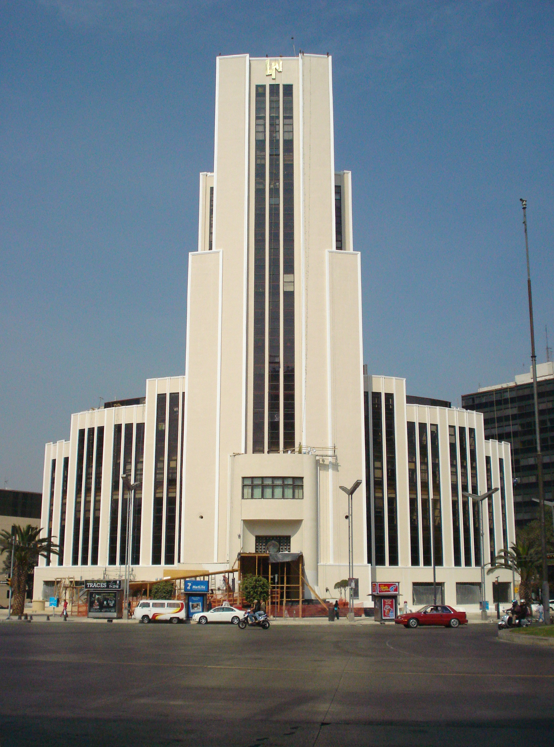 Edificio El Moro, con la fachada renovada.